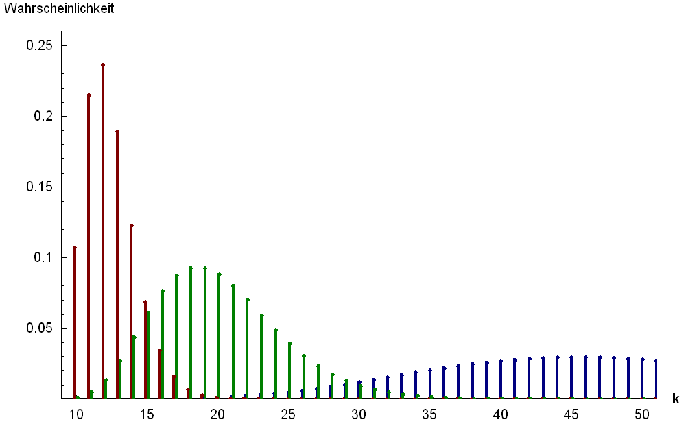 Negative Binomialverteilung mit r=10, p=0.2 (blau), p=0.5 (grün) und p=0.8 (rot)